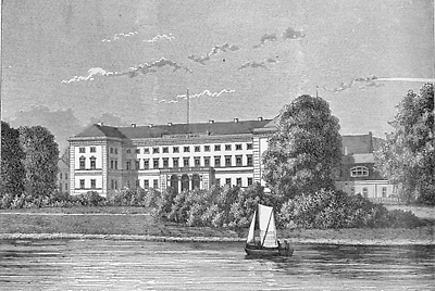 Sorø Akademi. Kgl. lærd Skole og Opdragelsesanstalt. Oprindelig et af Hvideslægten (Asker Ryg, Bisp Absalon) grundlagt Kloster. Efter Reformationen inddroges det under Kronen, men først 1580, efter den sidste Munks død, ophævedes det, og 1586 oprettedes her en kongelig Skole, til hvilken der 1623-65 knyttedes et adeligt Akademi. 1747 omdannedes Skolen, til hvilken Holberg skænkede Godserne Terløse og Brorup, til et ridderligt Akademi. 1813 nedbrændte Bygningerne. 1822-26 opførtes den nye Bygning, der atter blev lærd Skole og Akademi, hvilket sidste dog inddroges 1849 - I Pavillonen tilhøjre for Akademiet boede Digteren Ingemann i henved 40 Aar til sin Død d. 24. Febr. 1862.